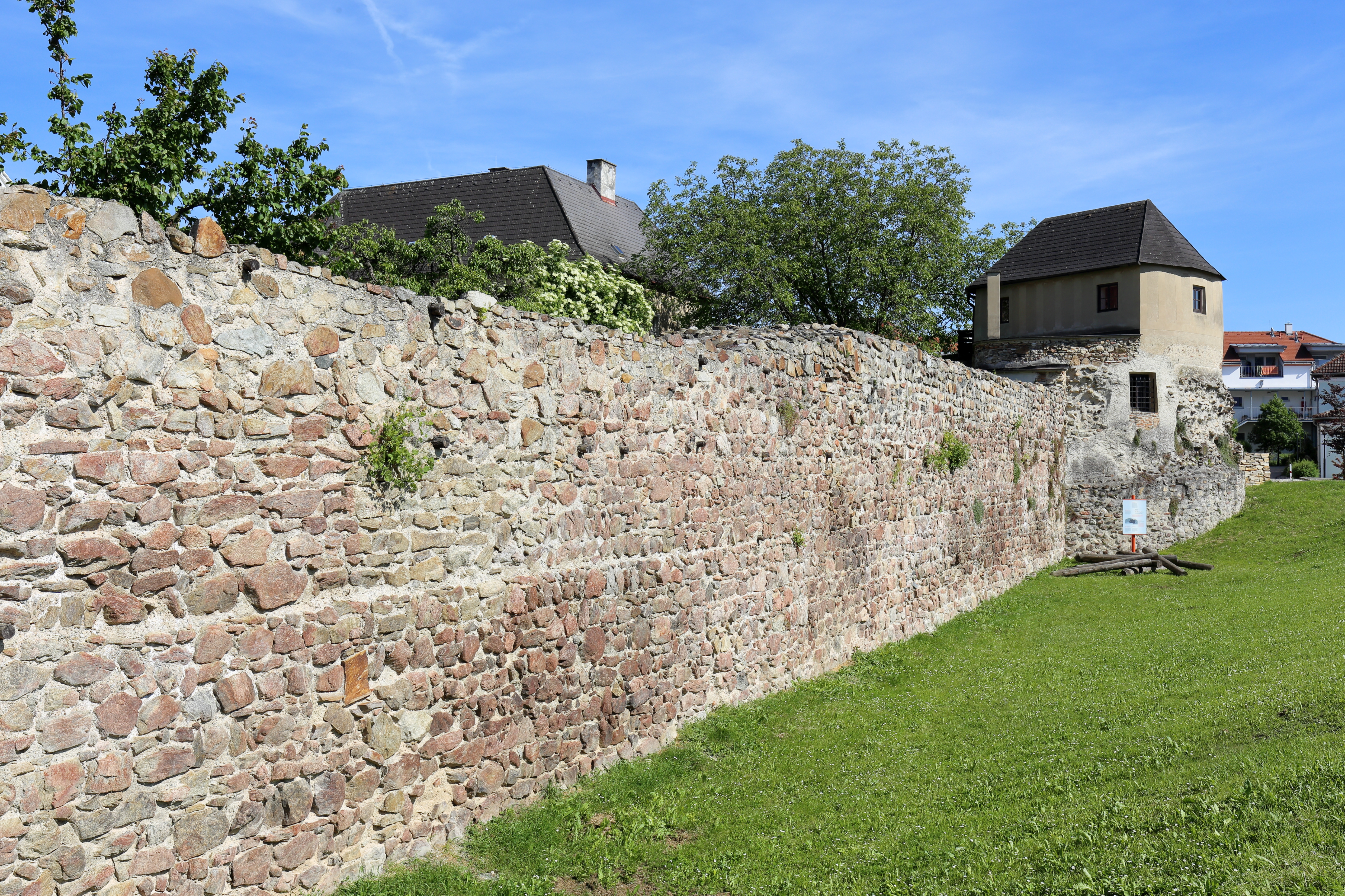 Westmauer des ehemaligen Kastells Favianis in der niederösterreichischen Stadt Mautern an der Donau im Bereich des Hufeisen- und Fächerturmes (im Hintergrund) mit Blickrichtung Südsüdost.